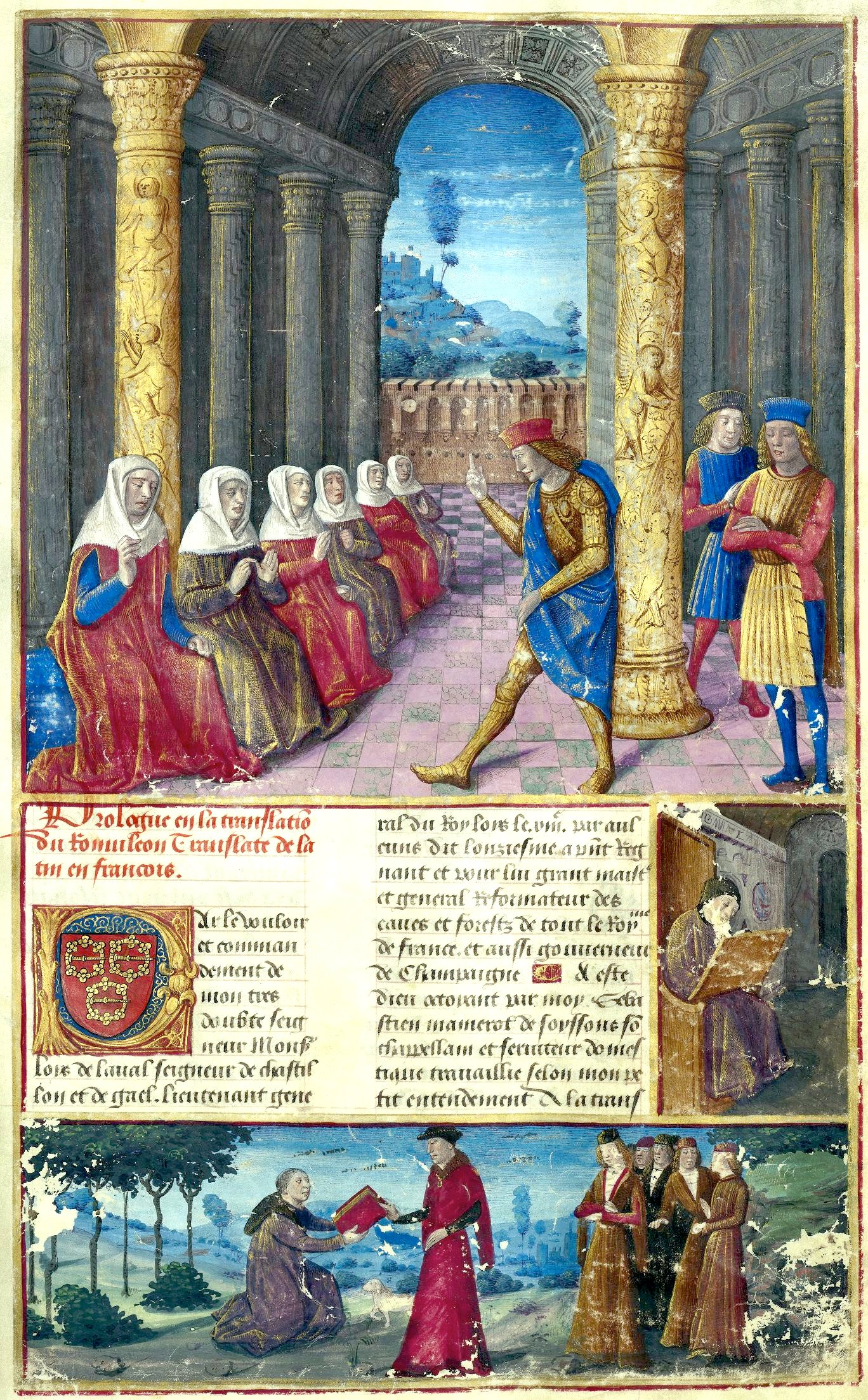 Romuleon-BnF364-f13r. Romuléon de Benvenuto da Imola, dans la traduction de Sébastien Memerot, illustré par Jean Colombe et son atelier.